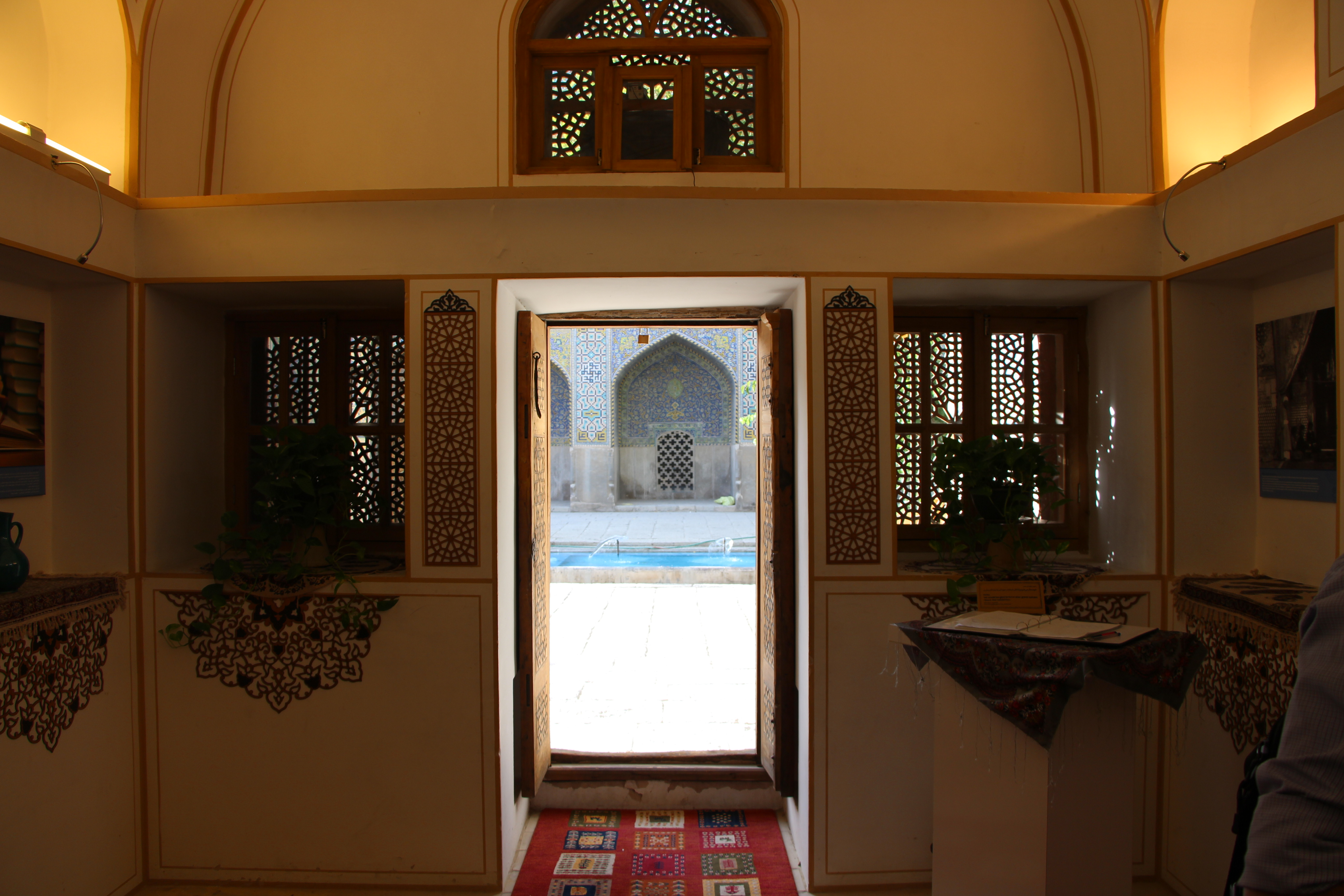 نمايي از داخل نمايشگاه واقع در مسجد امام اصفهان